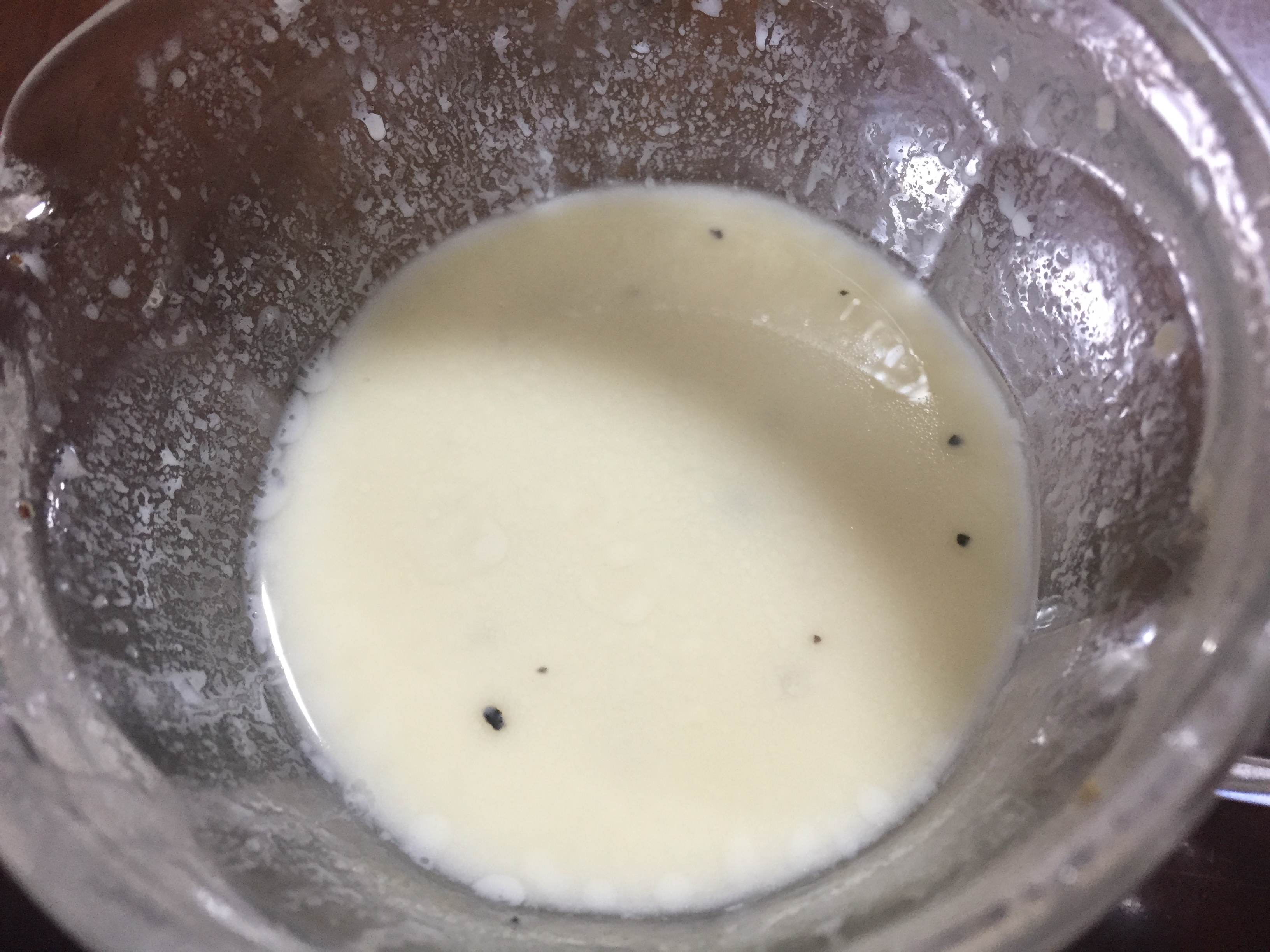 作り方をもとに調理したフレンチドレッシング白